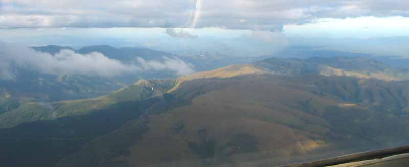 Источне планине у Зимбабвеу, Април 2003, Аутор Радован Корда, Објављено по изричитом одобрењу аутора